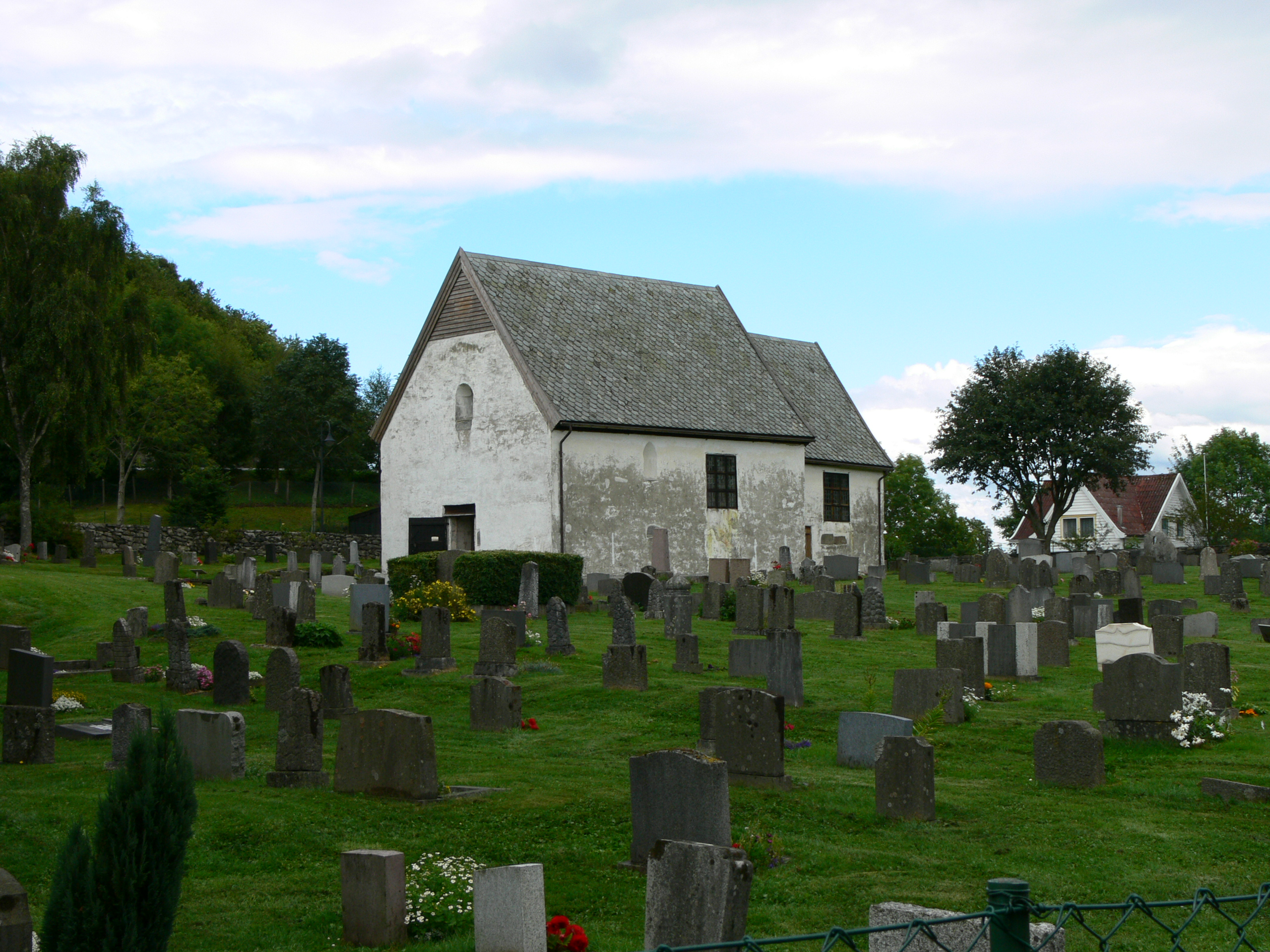 Norsk (nynorsk): Moster gamle kyrkje en: Moster old churchTatsächlich die älteste Kirche Norwegens, irgendwann vor langer Zeit mal gebaut, dann irgendwann viel später mit Bänken versehen und so Zeugs, Kreuze etc. Jetzt kann man noch drin heiraten.